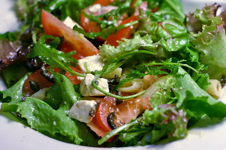 中文